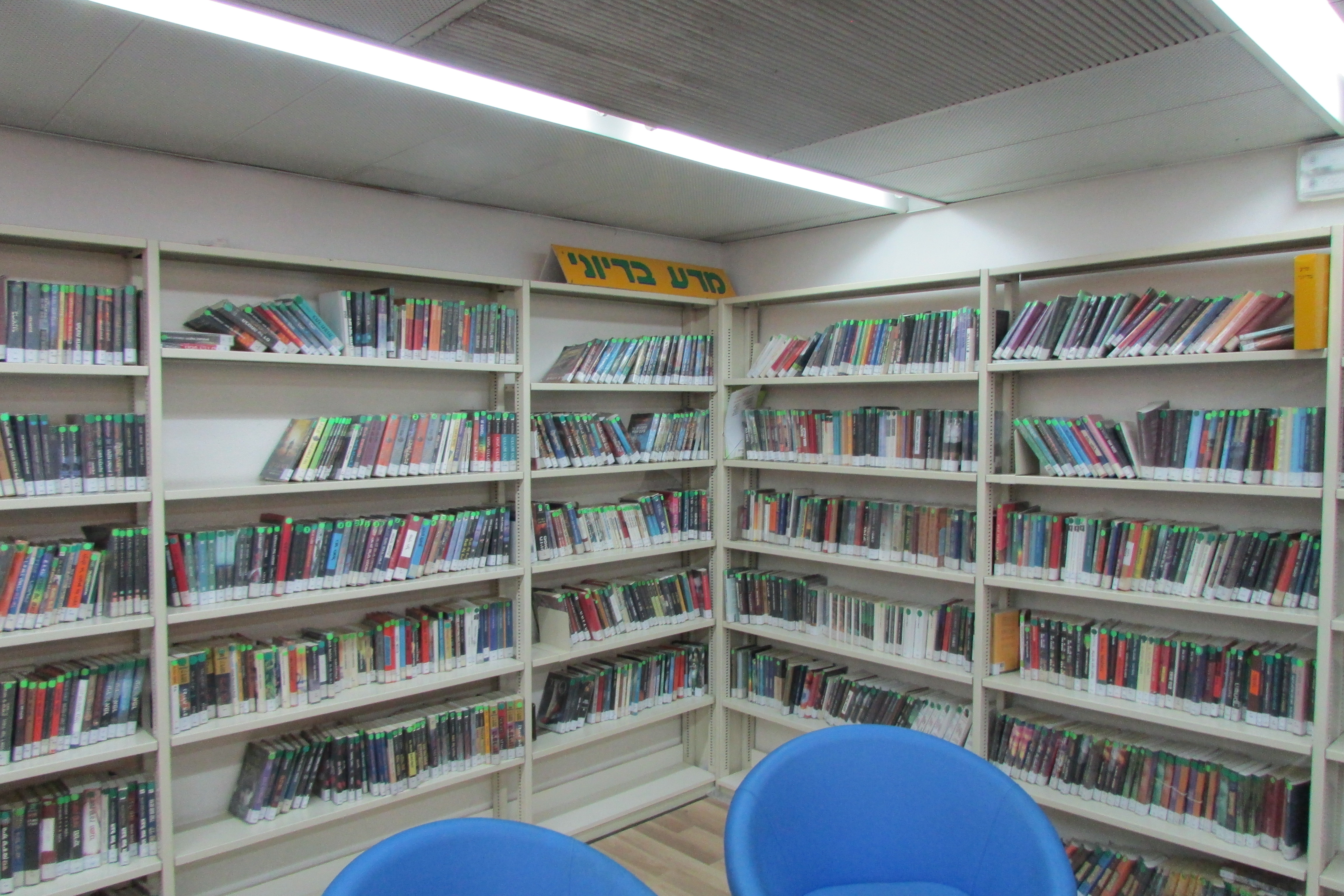 Raanana library